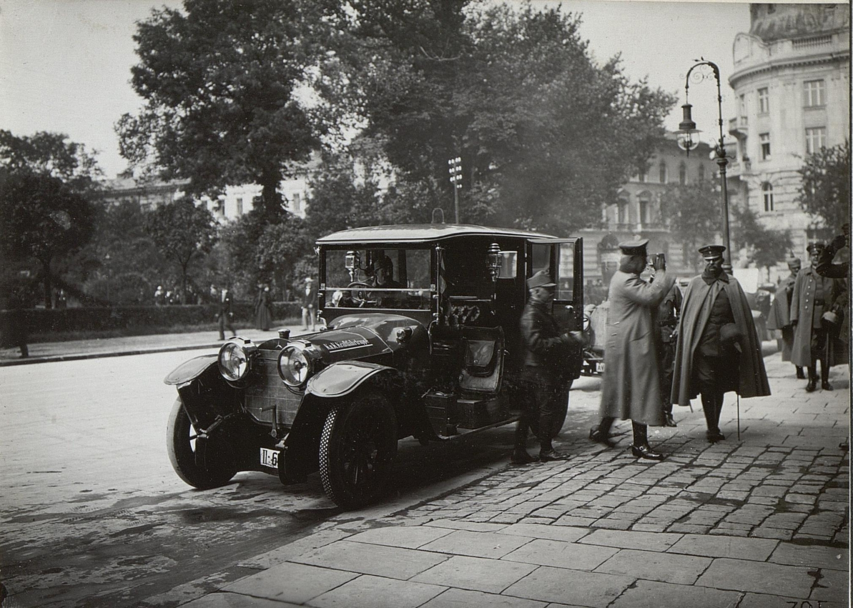 Kriegsalbum 106, Bild 32707